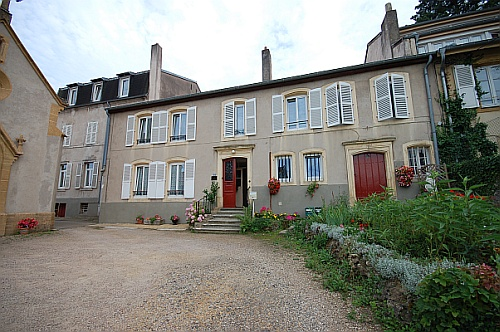 Maison où a vécu et est décédée CarolienCOLCHEN, devenue le foyer Carré de Malberg